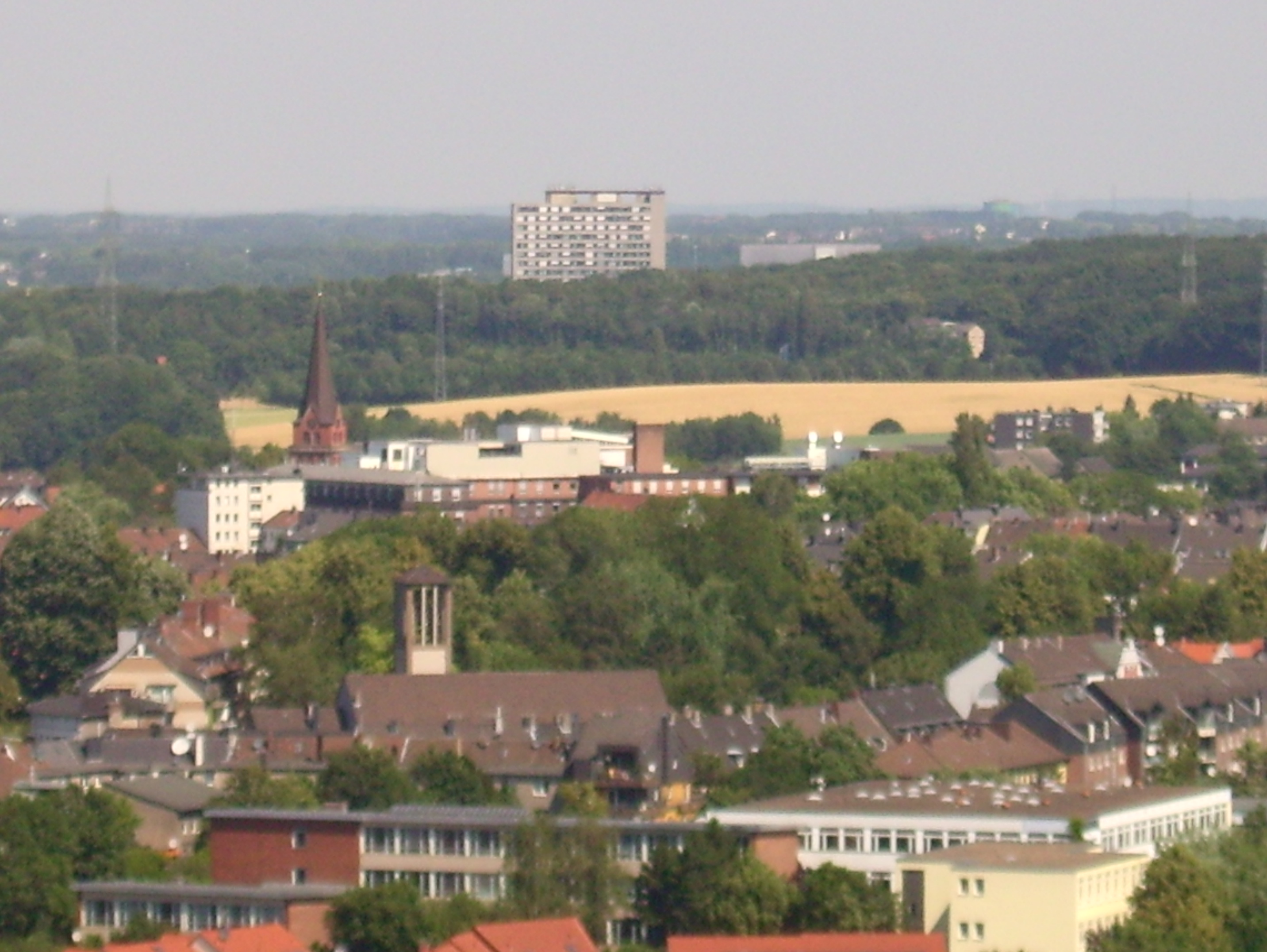 Knappschaftkrankenhaus Bochum, vom Helenenturm Witten aus gesehen, in der Bildmitte das Dach des Marienhospitals Witten